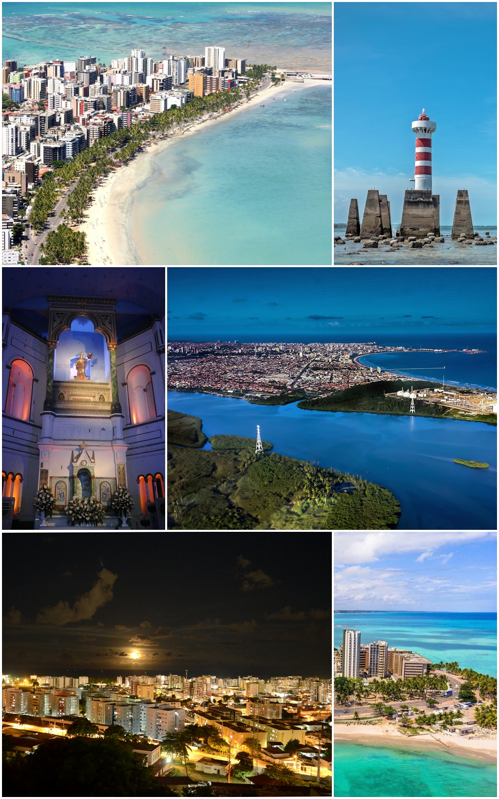 Imagens da cidade de Maceió.